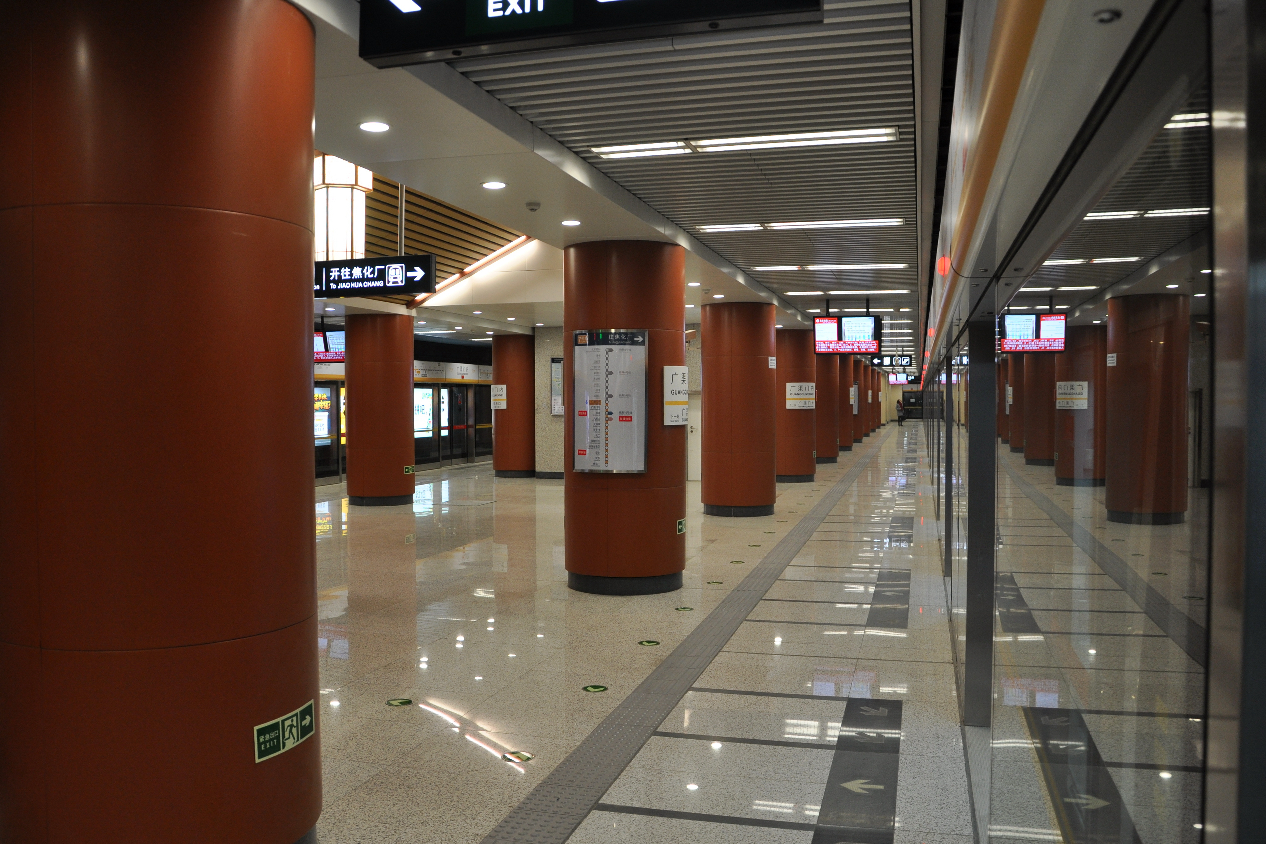 北京地铁7号线广渠门内站站台。